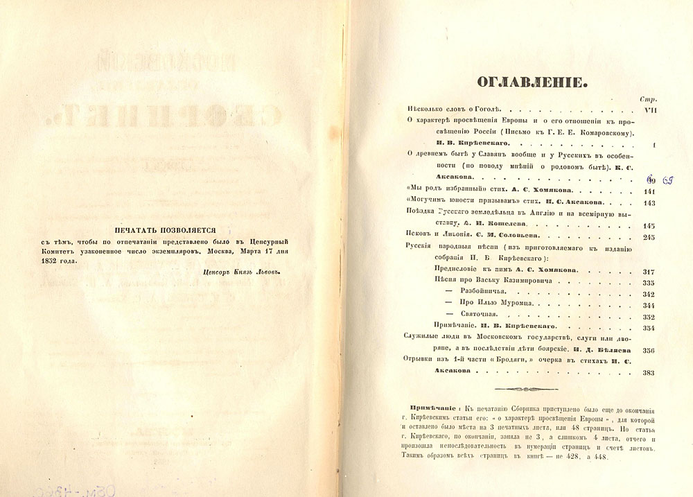 Оглавление первого тома "Московского сборника" (1852)